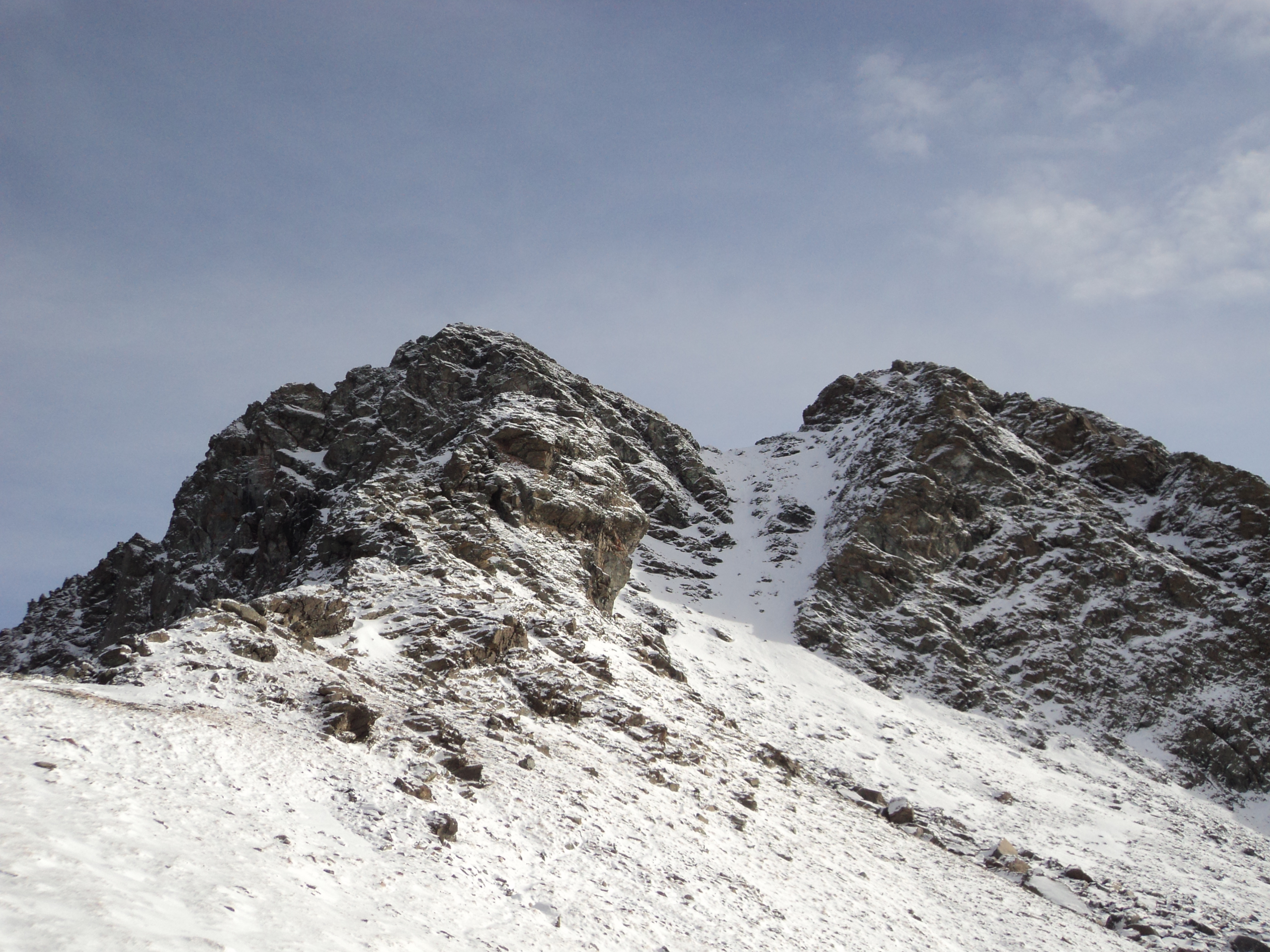 Le due vette del monte Orsiera nord e sud viste dal colle dell'Orsiera